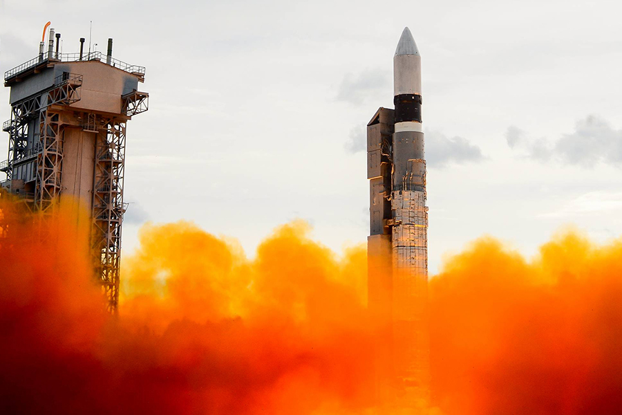 Пуск ракеты космического назначения легкого класса «Рокот» с блоком космических аппаратов связи «Гонец-М» (ГИК Плесецк, Архангельская обл.)